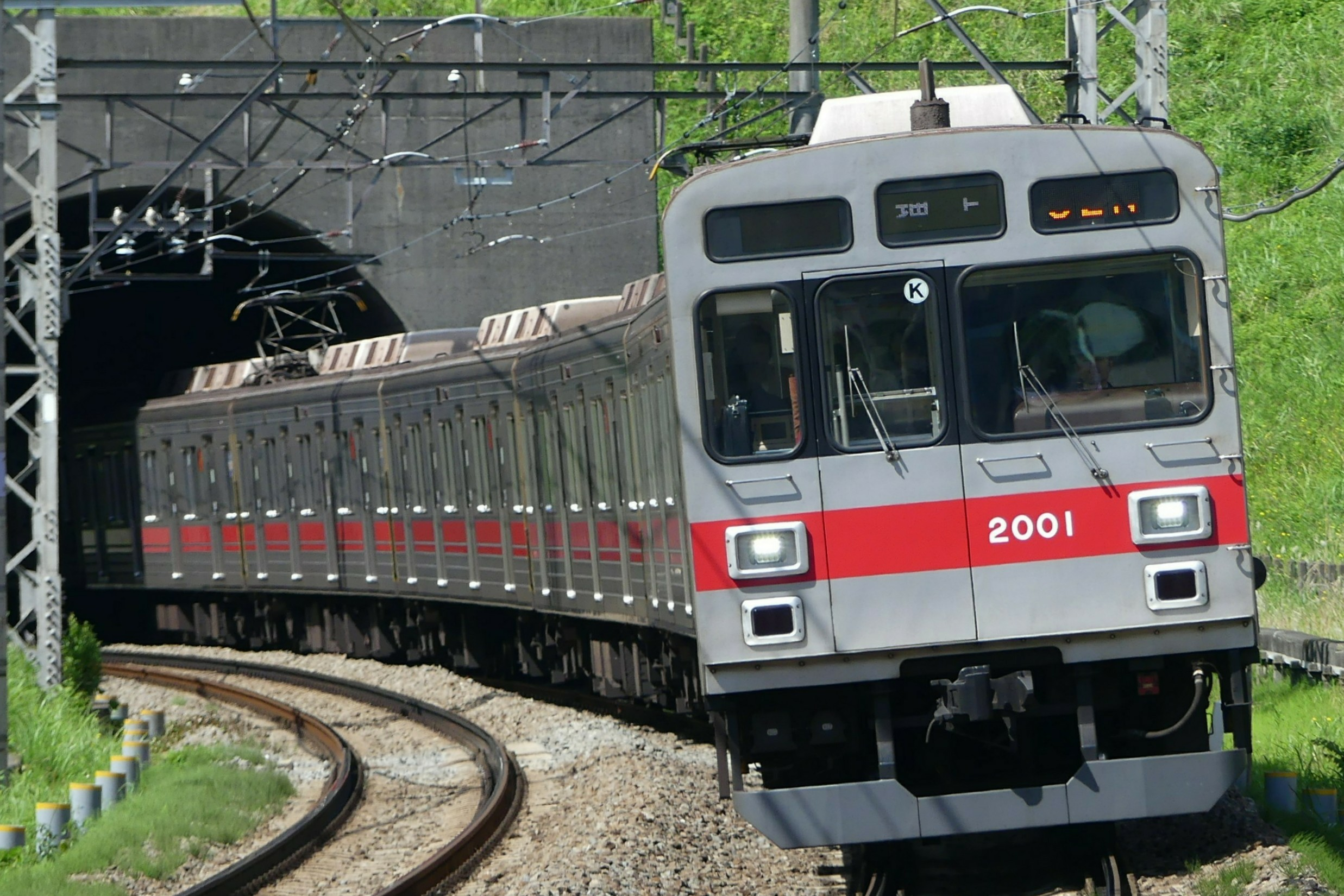 東急電鉄2000系